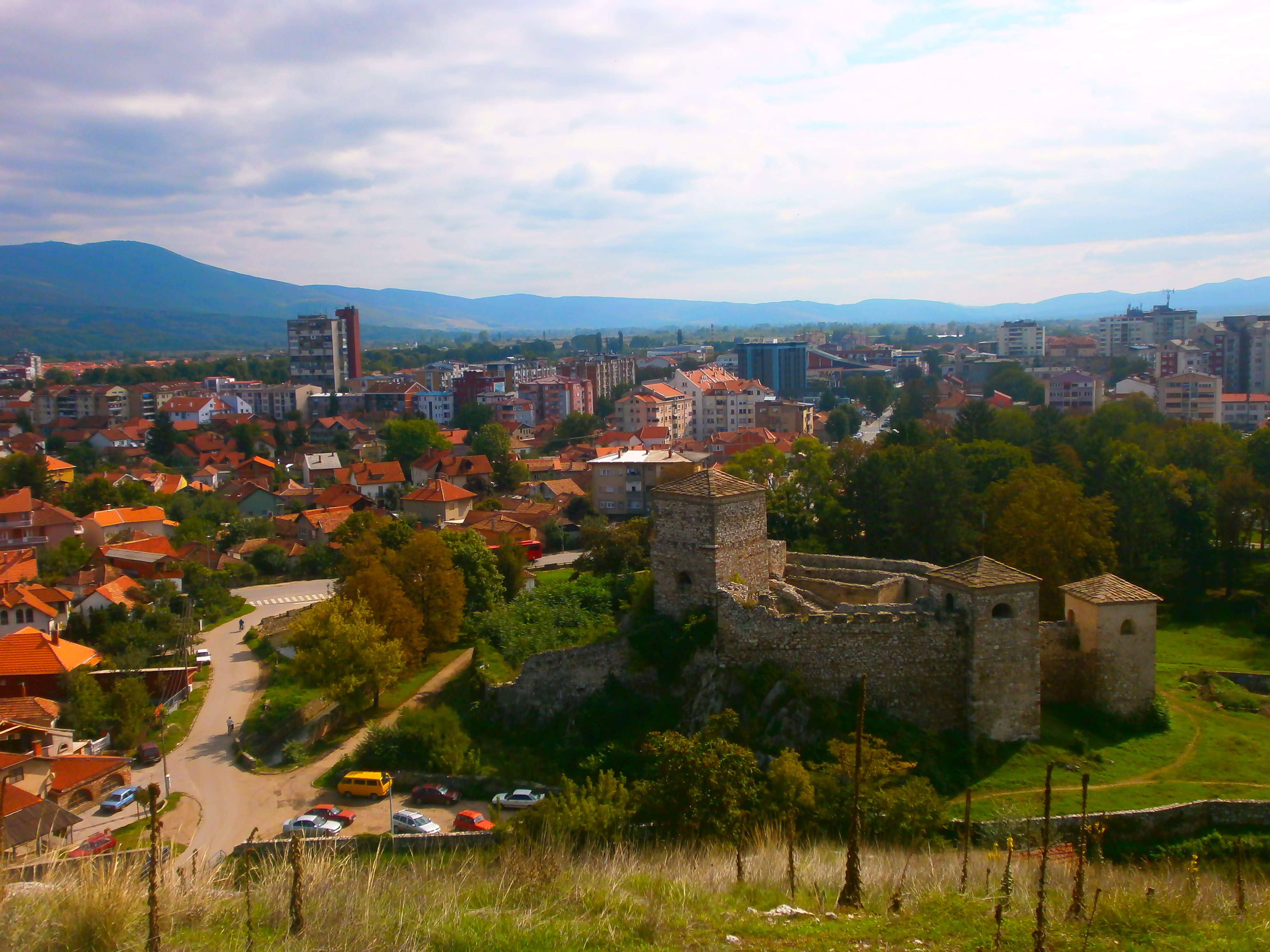 Srpski (latinica): Pirotski grad, Pirot